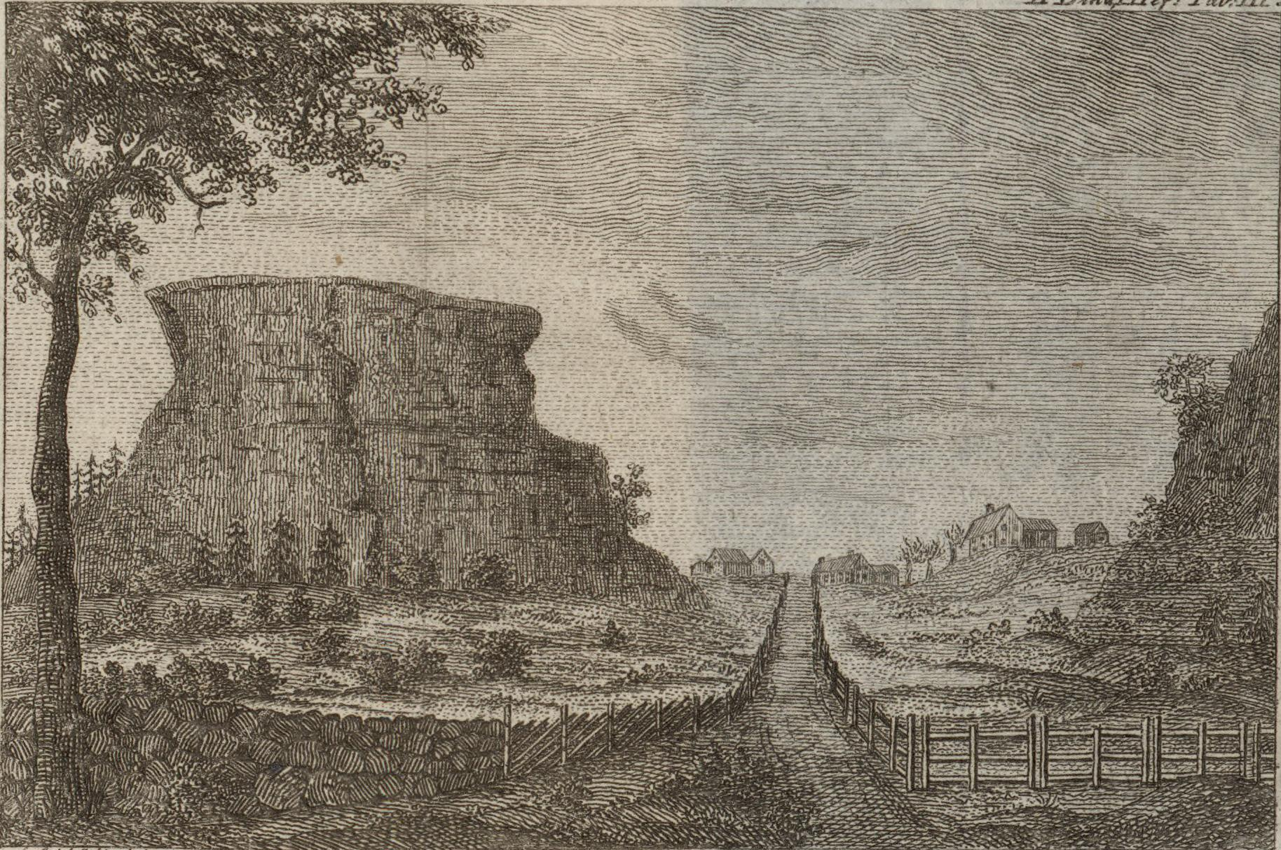 Illustrasjon hentet fra boken "Om Sverresborg ved Trondhjem" av Werlauff, E.C. og utgitt av ([København], [1815])